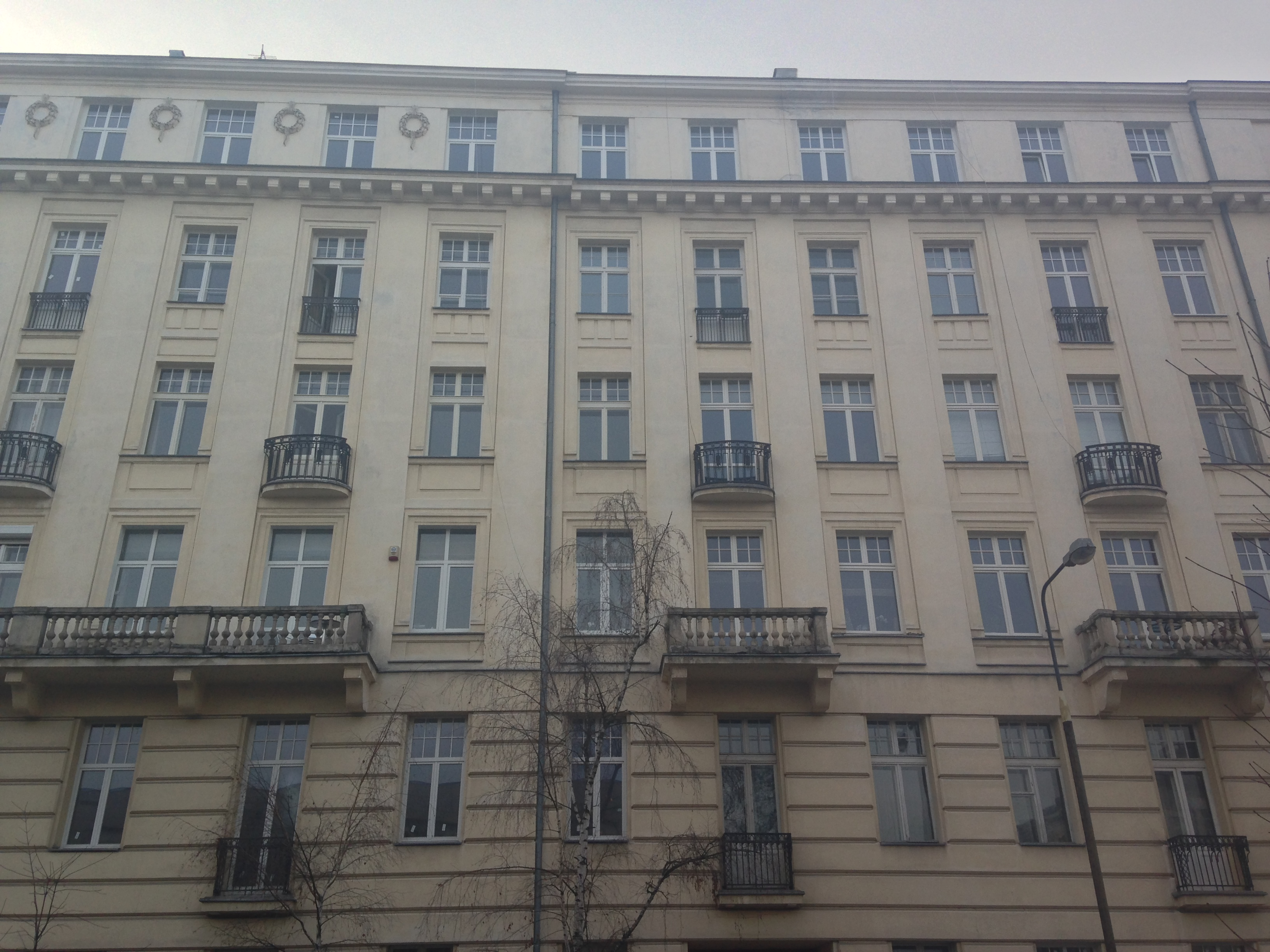 Kamienica Ordynacka - fasada od ulicy Okólnik